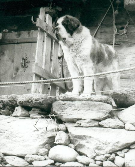 Beschreibung: Bernhardiner Hund - stattliche Statur und imposantes Auftreten. Quelle: Deutsche Wikipedia, Foto von Michael Huwiler, Benutzer:Huwi dort nach PD freigegeben